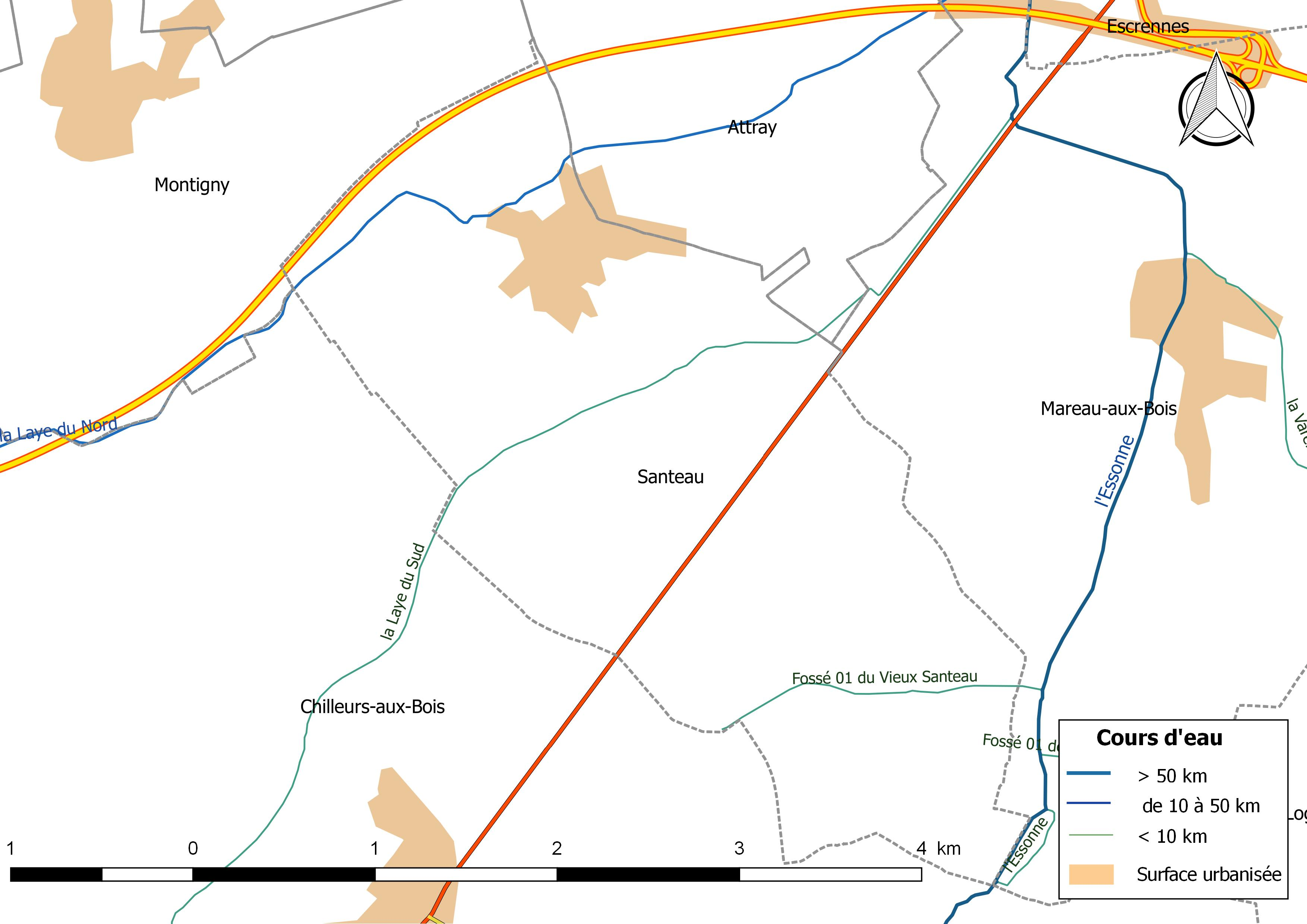 Carte du réseau hydrographique de la commune de Santeau (France).